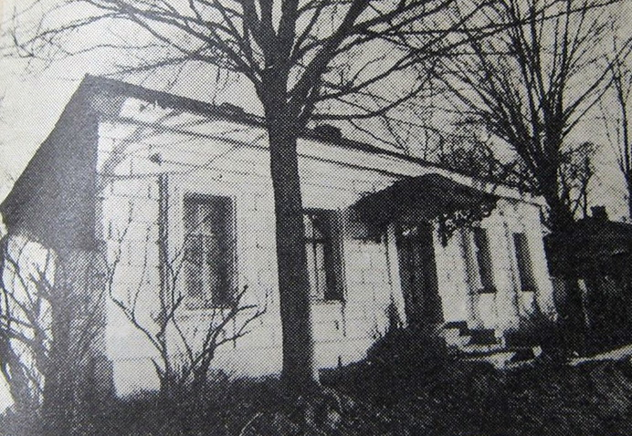 Почтовая станция в д. Застенки, Оршанский район. Середина XIX века.